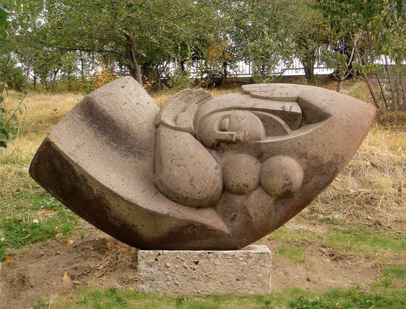 Գալակտիկա, Երևան 6/231